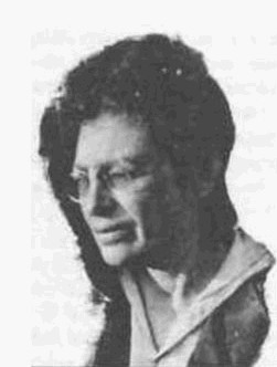 Berta Fantová (1865-1918), pražská německy hovořící intelektuálka, průkopnice ženského hnutí v českých zemích